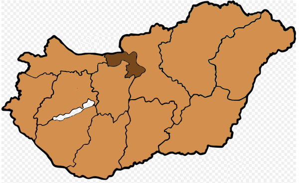 Mappa dell'arcidiocesi cattolica di Esztergom-Budapest, in Ungheria. Lavoro personale eseguito da questa immagine di Commons.